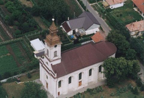 Szent Mihály és Gábor főangyalok-templom (nagylétai görögkatolikus templom, létavértesi görögkatolikus nagytemplom), 1803-ban (más források szerint 1836-37-ben) épült klasszicizáló későbarokk stílusban. azonosító 5354 (törzsszám 1890) - Létavértes, Hungary, aerialphotography